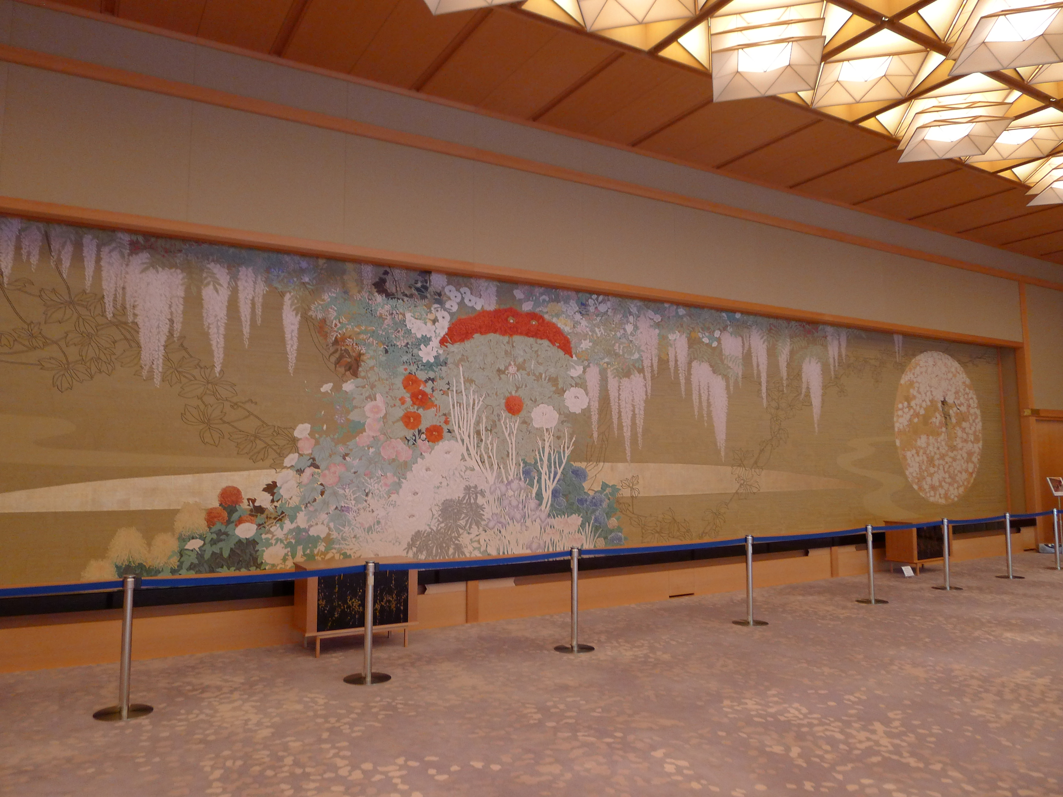 京都迎賓館：洋食晩餐会などの会場となる「藤の間」